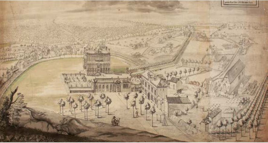 Het jachthuis van Bosvoorde op een tekening van F.-J. Derons uit 1752. Opschrift: het Casteel, het hoogh huis, het hondecot, de groote dreef, den Watermùeulen, den Vleugh.